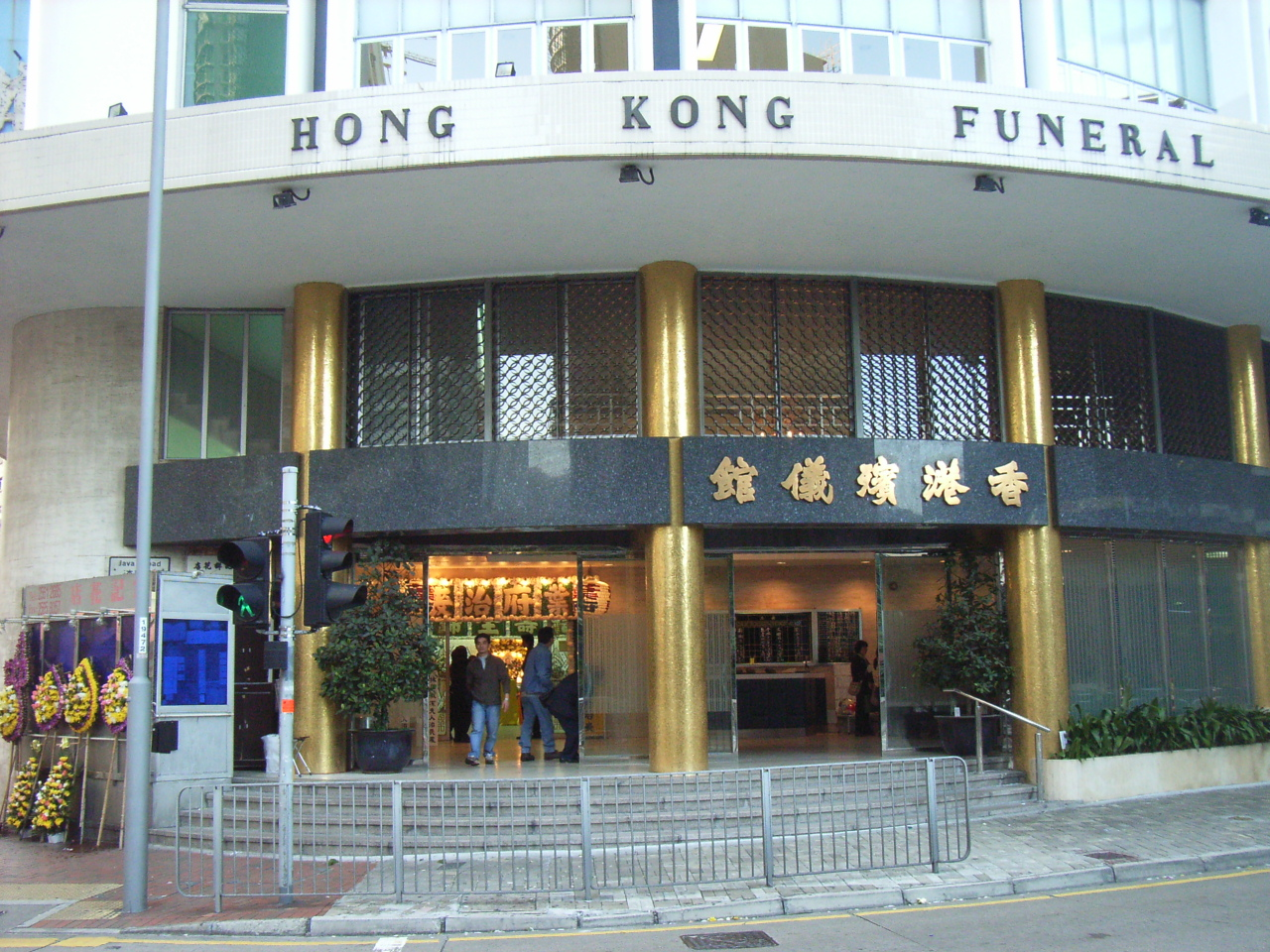 香港殯儀館（Hong Kong Funeral Home). Photographer is User:Huang Kong Hing